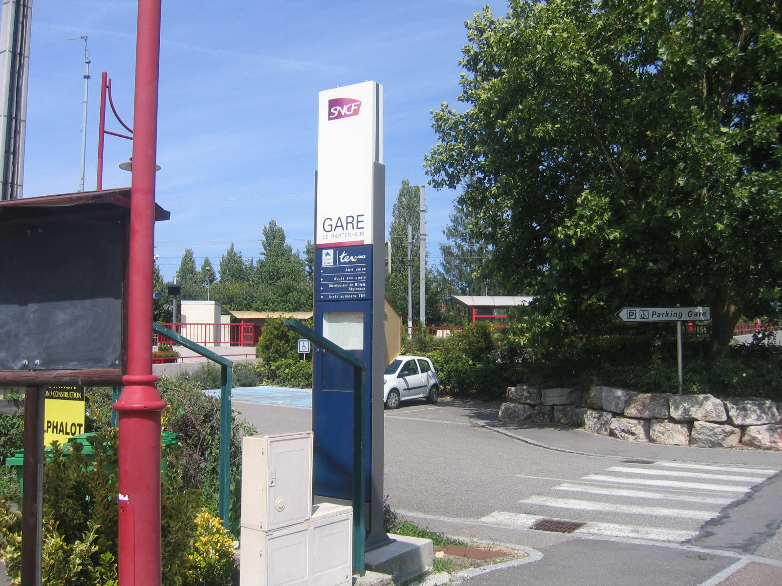 La gare de Bartenheim vue depuis la rue de la Gare.